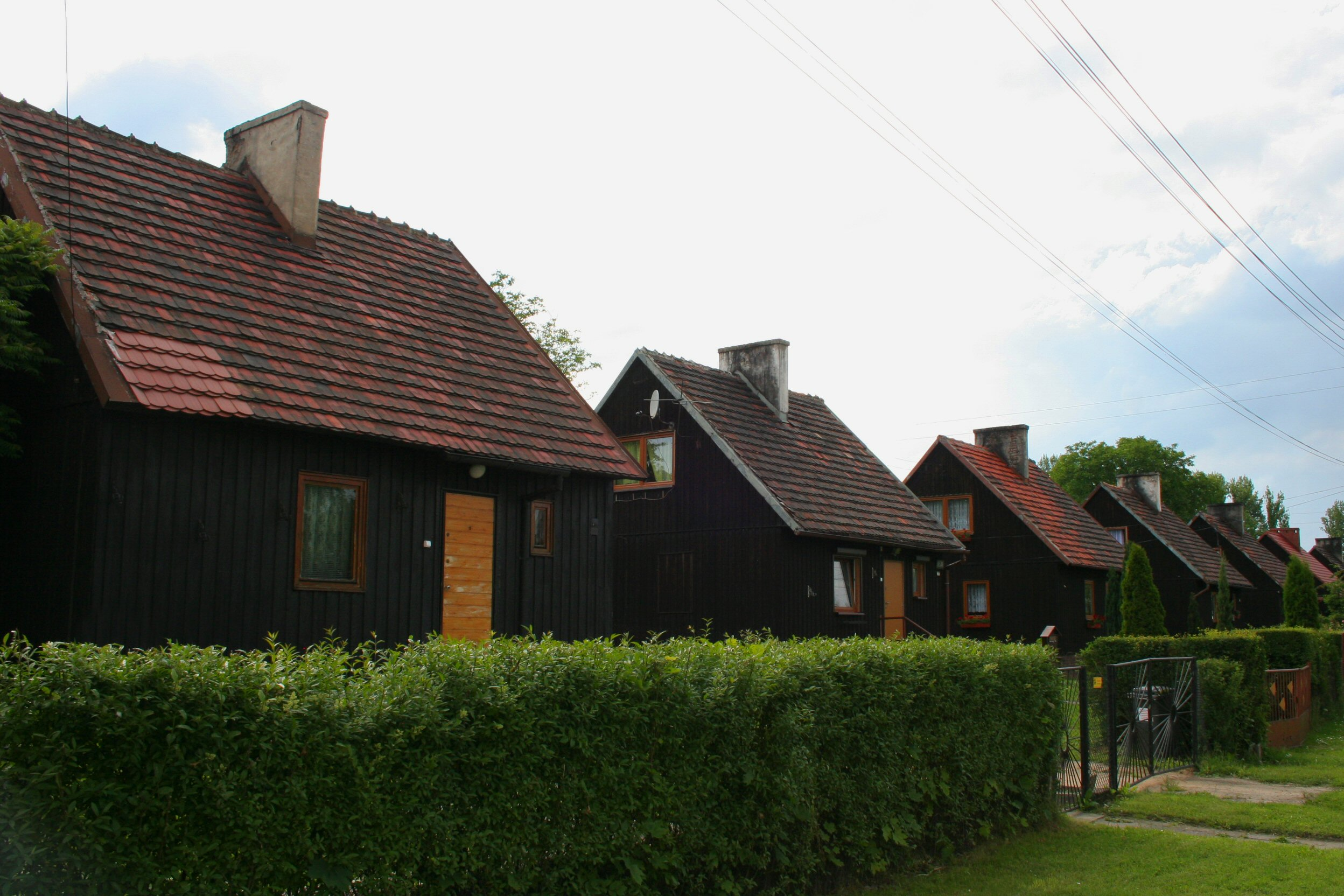 Fińskie domki w Bytomiu Szombierkach.